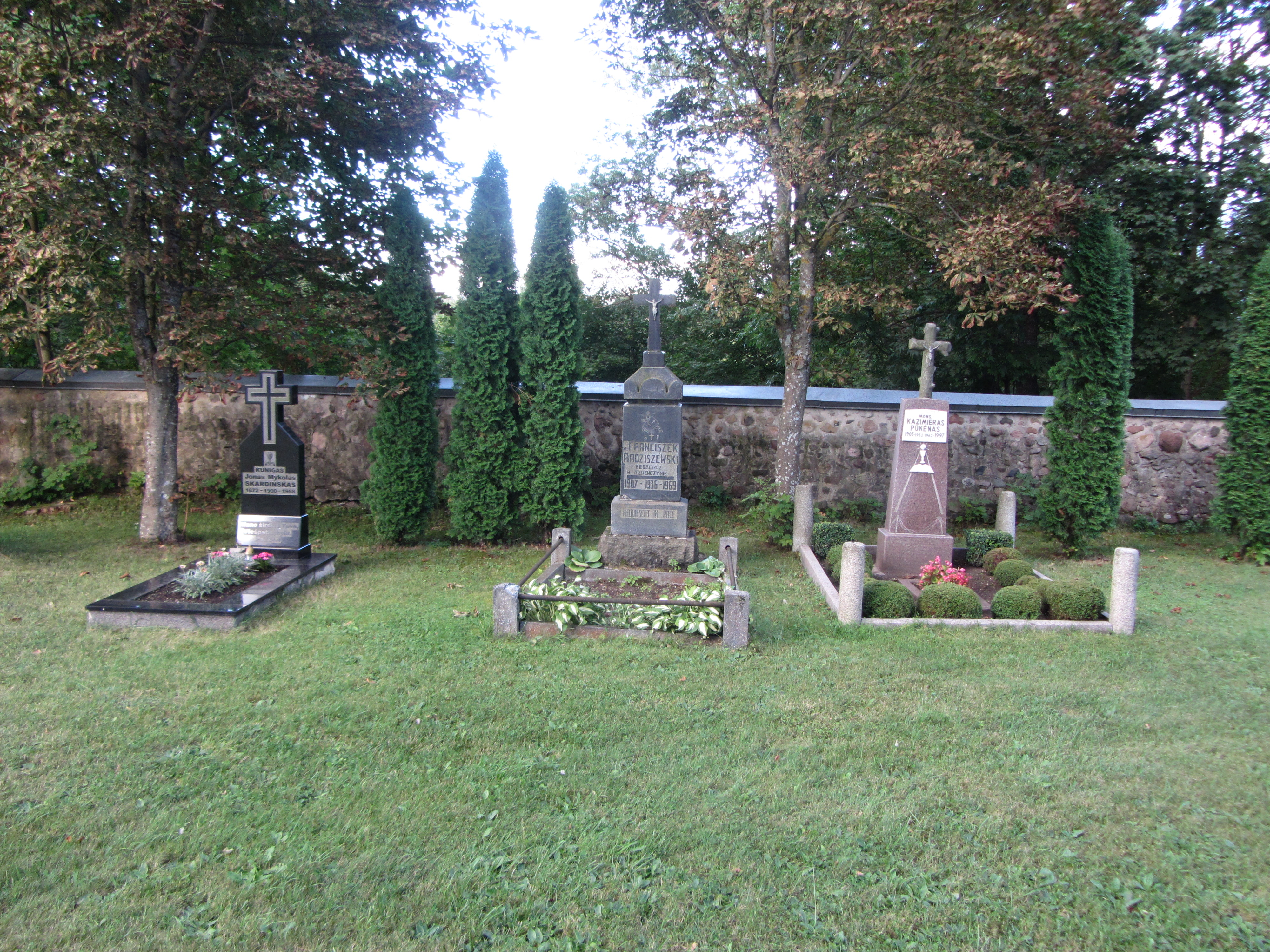 Nemenčinė, Lithuania